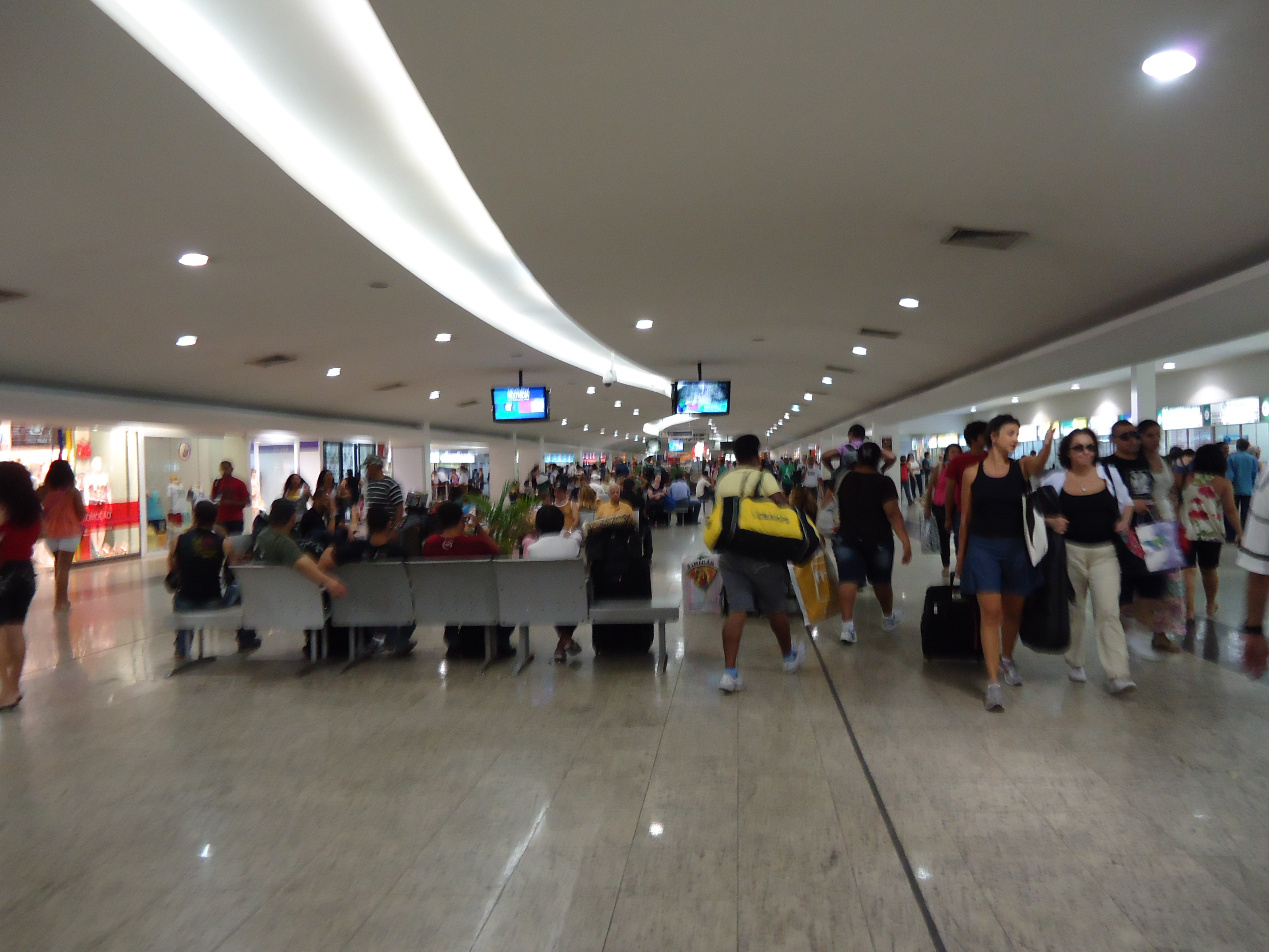 Rodoviária Novo Rio